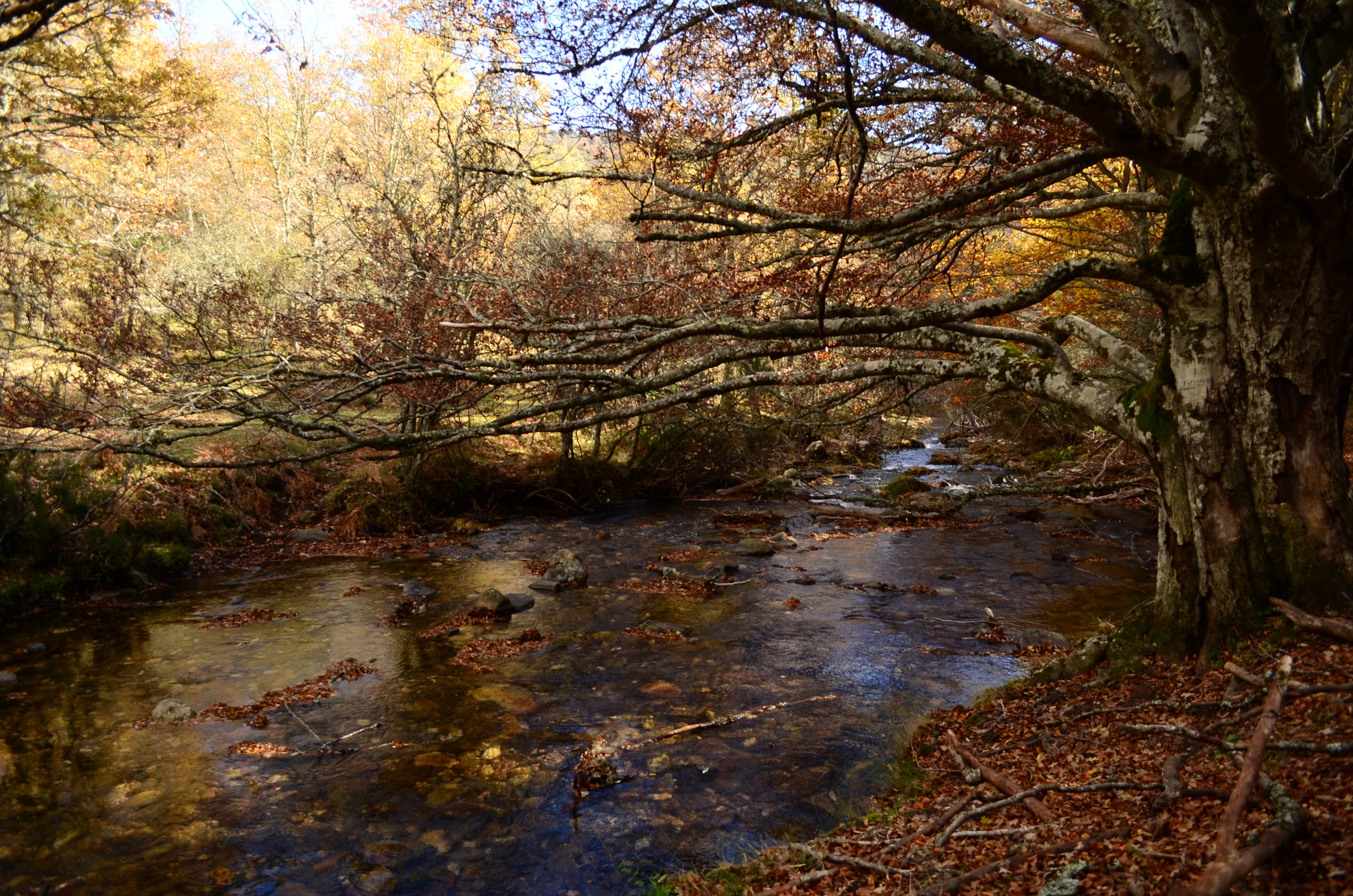 Cuenca del río Lozoya y Sierra Norte This is a photography of a Site of Community Importance in Spain with the ID: ES3110002. Natura2000 entry, EEA entry